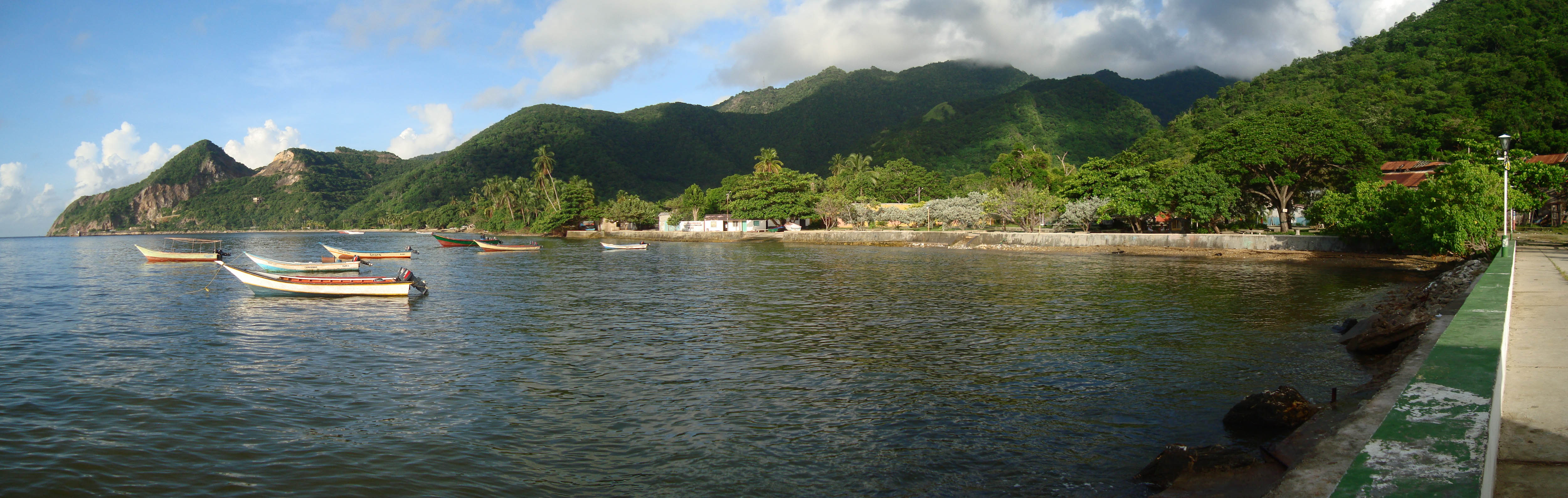 Macuro